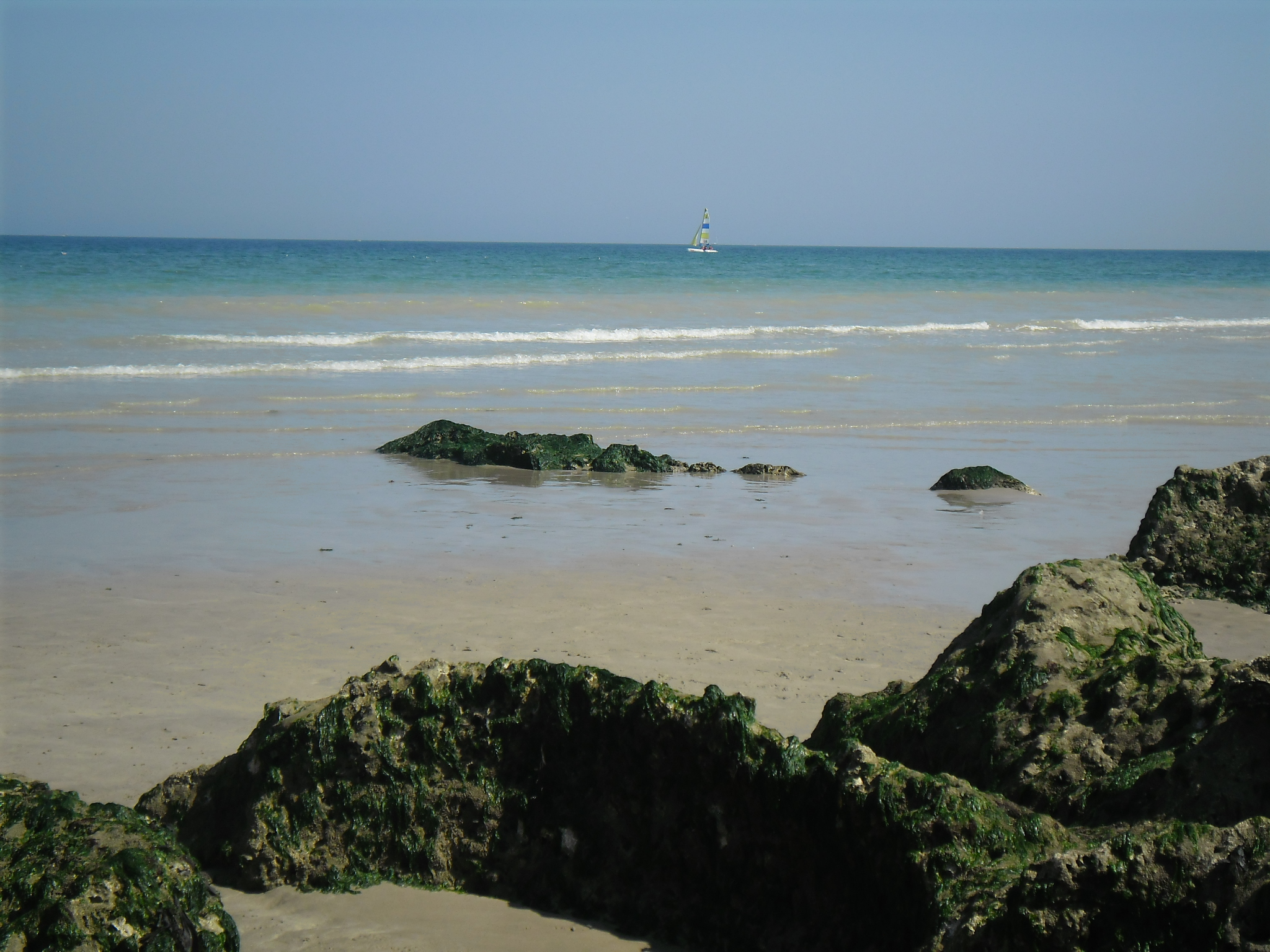 Plage de Dieppe (France) à marée basse en 2012